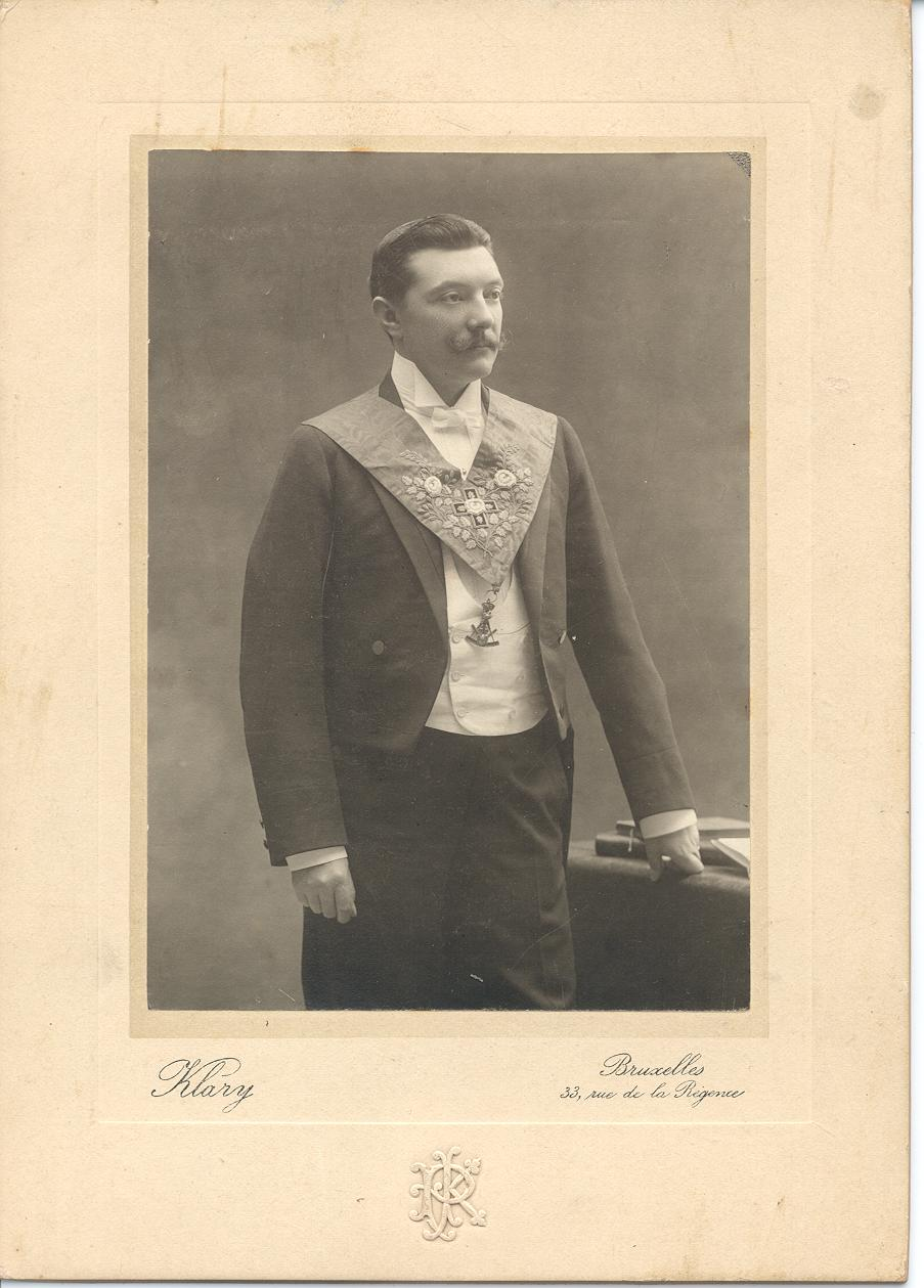 photographie de l'architecte Henri van Dievoet (1869-1931) avec un sautoir maçonnique de Chevalier Rose Croix, de la Respectable Loge, Les Vrais Amis de l'Union et du Progrès Réunis à l'Orient de Bruxelles". photographie par Klary, photographe rue de la Régence, Bruxelles.